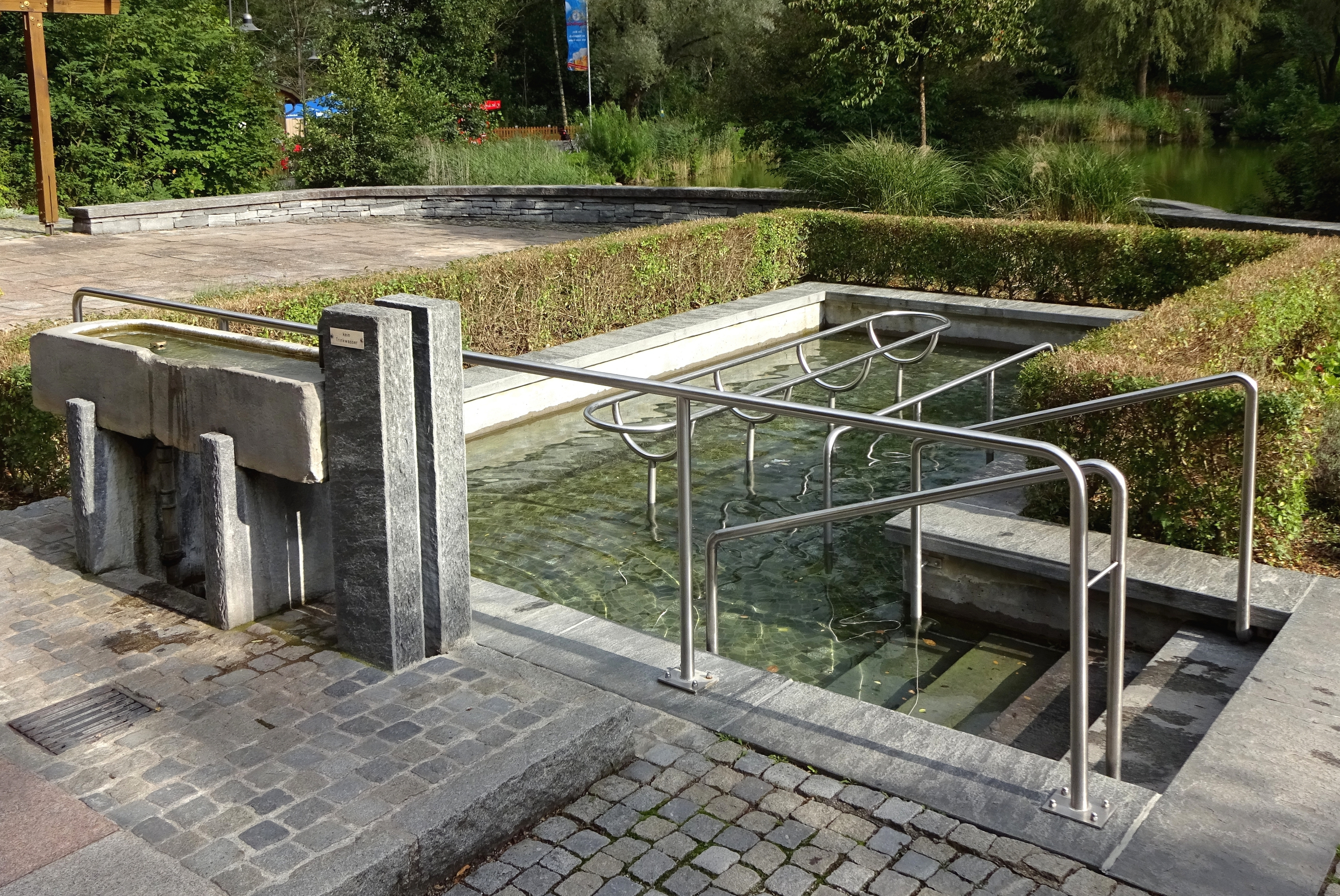 August 2014